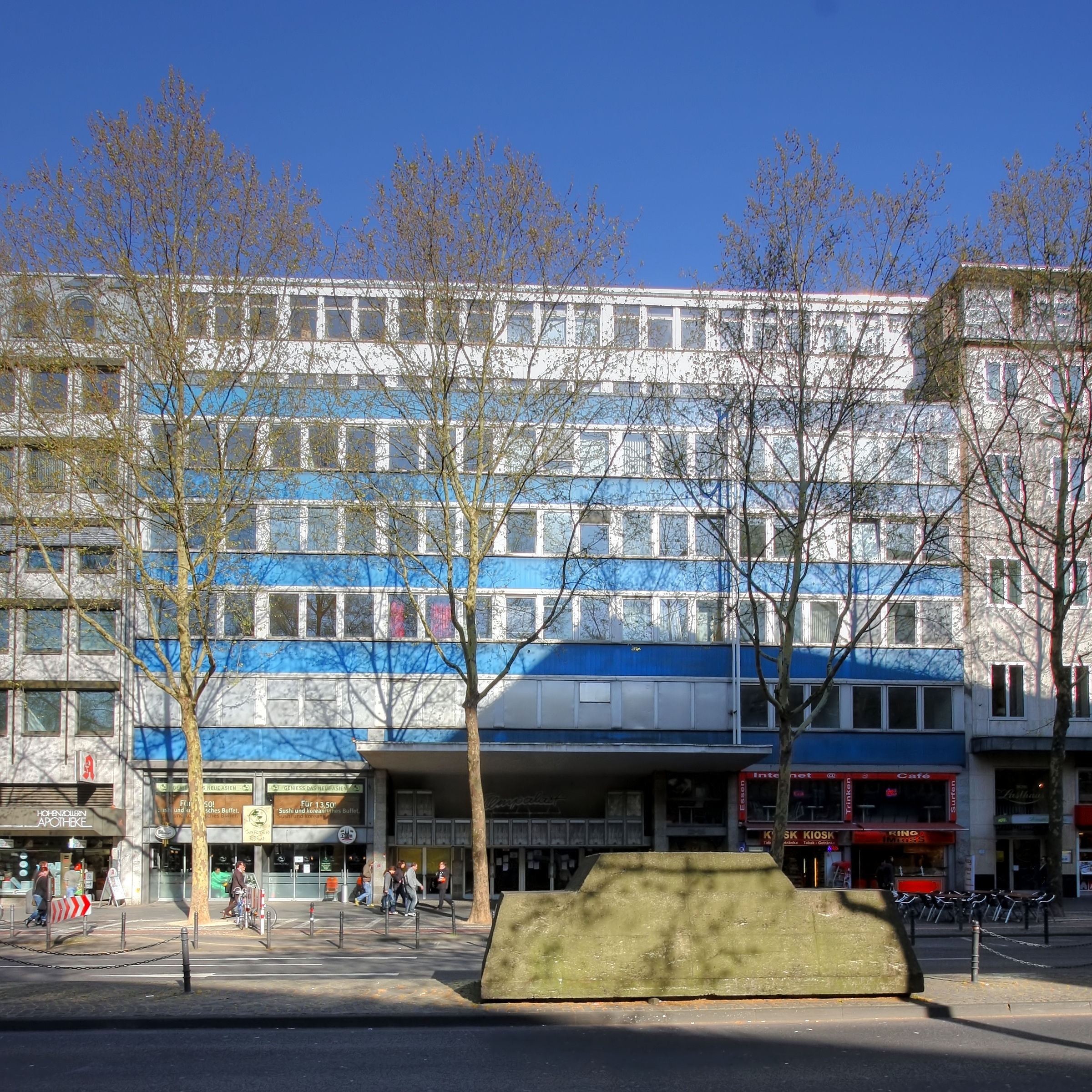 Ufa Filmpalast, Hohenzollernring 22-24, Köln. Architekt: Wilhelm Riphahn, Baujahr: 1931Im Vordergrund: Plastik „Ruhender Verkehr“ von Wolf Vostell